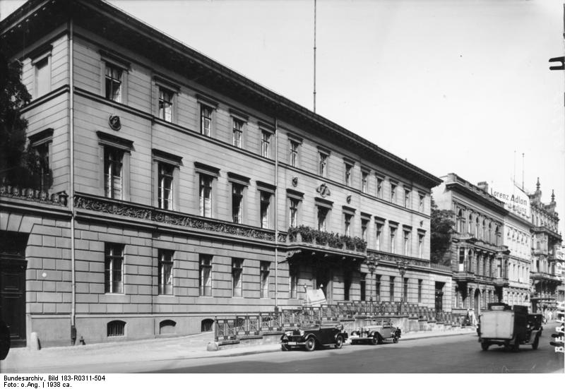 ADN-ZB/Archiv Berlin Das Gebäude des Landwirtschaftsministeriums in der Wilhelmstraße. (Aufnahme: um 1938)